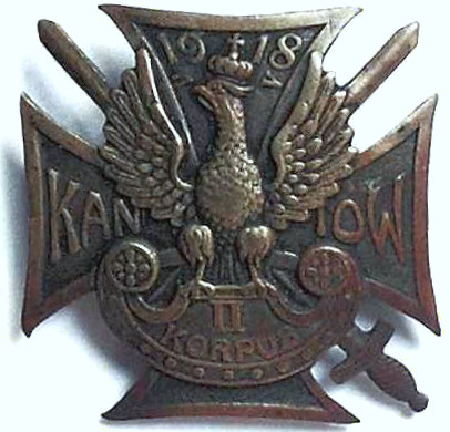 Odznaka pamiątkowa Związku Kaniowczyków; "1918 - Kaniów - II Korpus"; wykonanie z mosiądzu